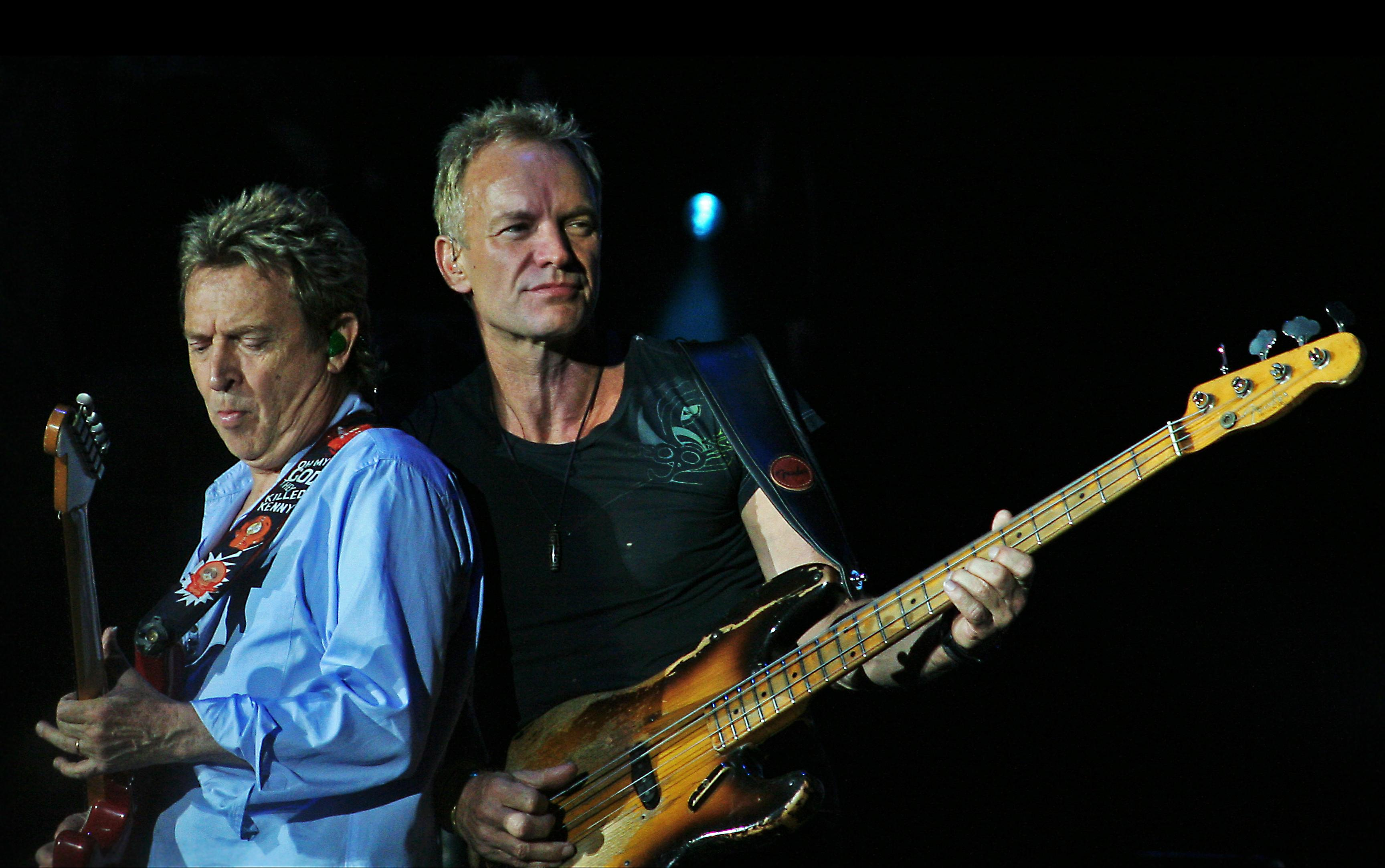 Sting